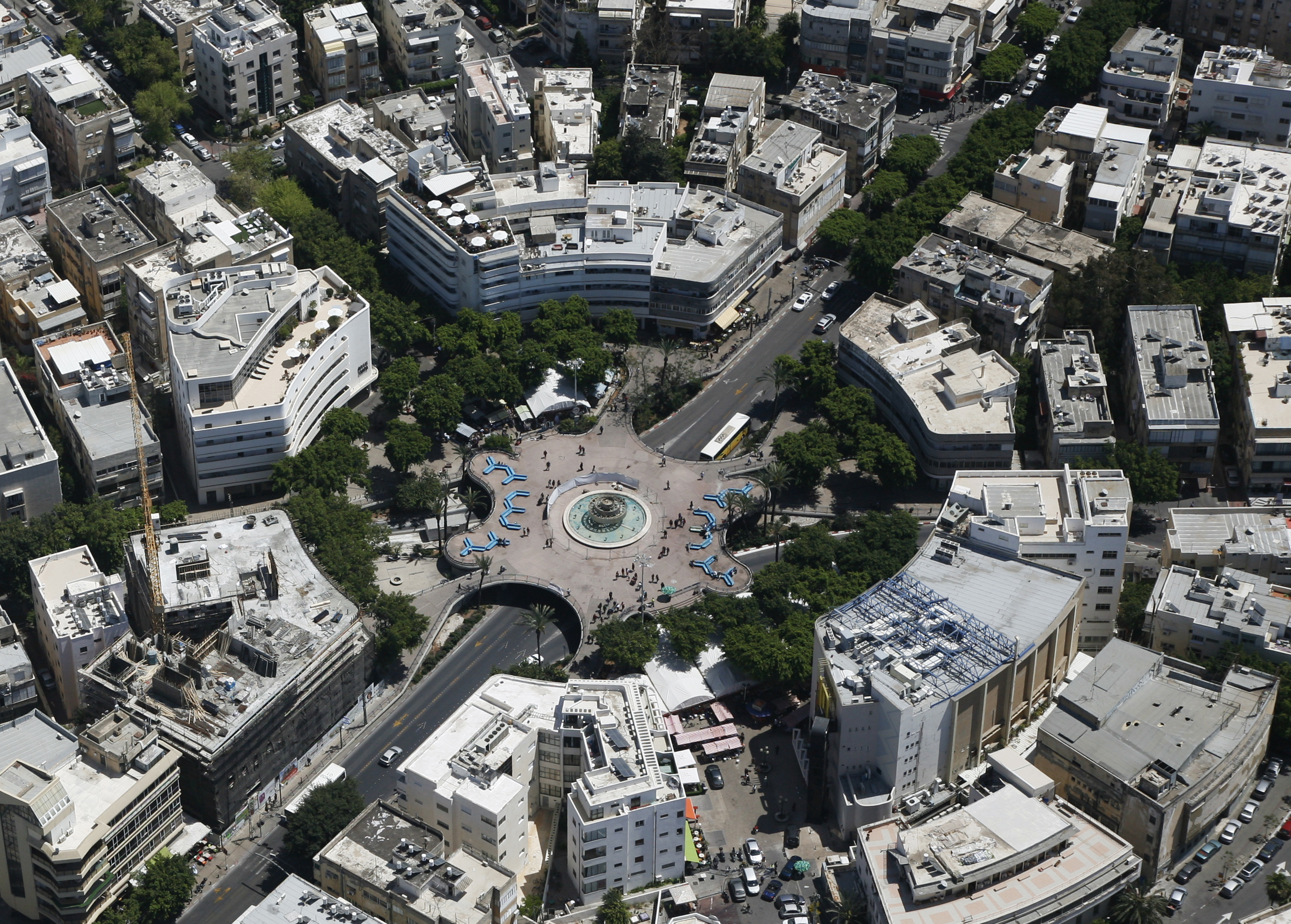 כיכר צינה דיזנגוף קרויה על שם צינה דיזנגוף, רעייתו של ראש העיר הראשון, מאיר דיזנגוף. הכיכר נחשבה במשך שנים רבות כאחד מסמליה של תל אביב. הכיכר הייתה חלק מתוכנית גדס, תוכנית מתאר לעיר תל אביב שהכין פטריק גדס, מתכנן ערים סקוטי. עיצוב הכיכר נעשה על ידי האדריכלית ג'ניה אוורבוך, שזכתה בתחרות העיצוב של הכיכר בשנת 1934. התכנון היה על פי קריטריונים של הסגנון הבינלאומי, שהיה הסגנון האדריכלי המרכזי בתל אביב בתקופה זו.להיכנס